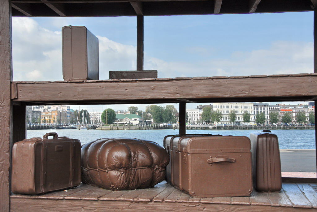 De Wilhelminakade kreeg zijn naam rond 1900 en is vernoemd naar Koningin Wilhelmina. De Wilhelminakade was de vestigingsplaats van de Holland-Amerika Lijn in de periode 1901-1971. Met name in de periode tot de Eerste Wereldoorlog vertrokken grote aantallen Oost-Europese volksverhuizers via de Wilhelminakade naar New York. De Nieuw Amsterdam vertrok in 1971 als laatste schip van de lijndienst op New York. Op de westelijke punt van de Wilhelminakade, het Koninginnehoofd, staat sinds 2001 het gietijzeren kunstwerk ‘Lost Luggage Depot’ van de Canadese beeldend kunstenaar en historicus Jeff Wall (1946-). Het is het symbool van het afscheid dat de vele emigranten namen van hun vorig leven. The Wilhelminakade, situated in Rotterdam along the river Maas, is named after the Dutch Queen Wilhelmina. The Holland-America shipping line had here her terminal from 1901 until 1971. In that period big numbers of emigrants from all over Europe left the continent for the USA, especially during the years before WO I. The SS (steamship) New Amsterdam was the last departing ship in 1971. On the west point of the Wilhelminakade, the Koninginnehoofd, stands since 2001 the ‘Lost Luggage Depot’ made by the Canadian plastic artist Jeff Wall (1946-). It is made of cast iron and symbolizes the goodbye of the many emigrants to their former lives.